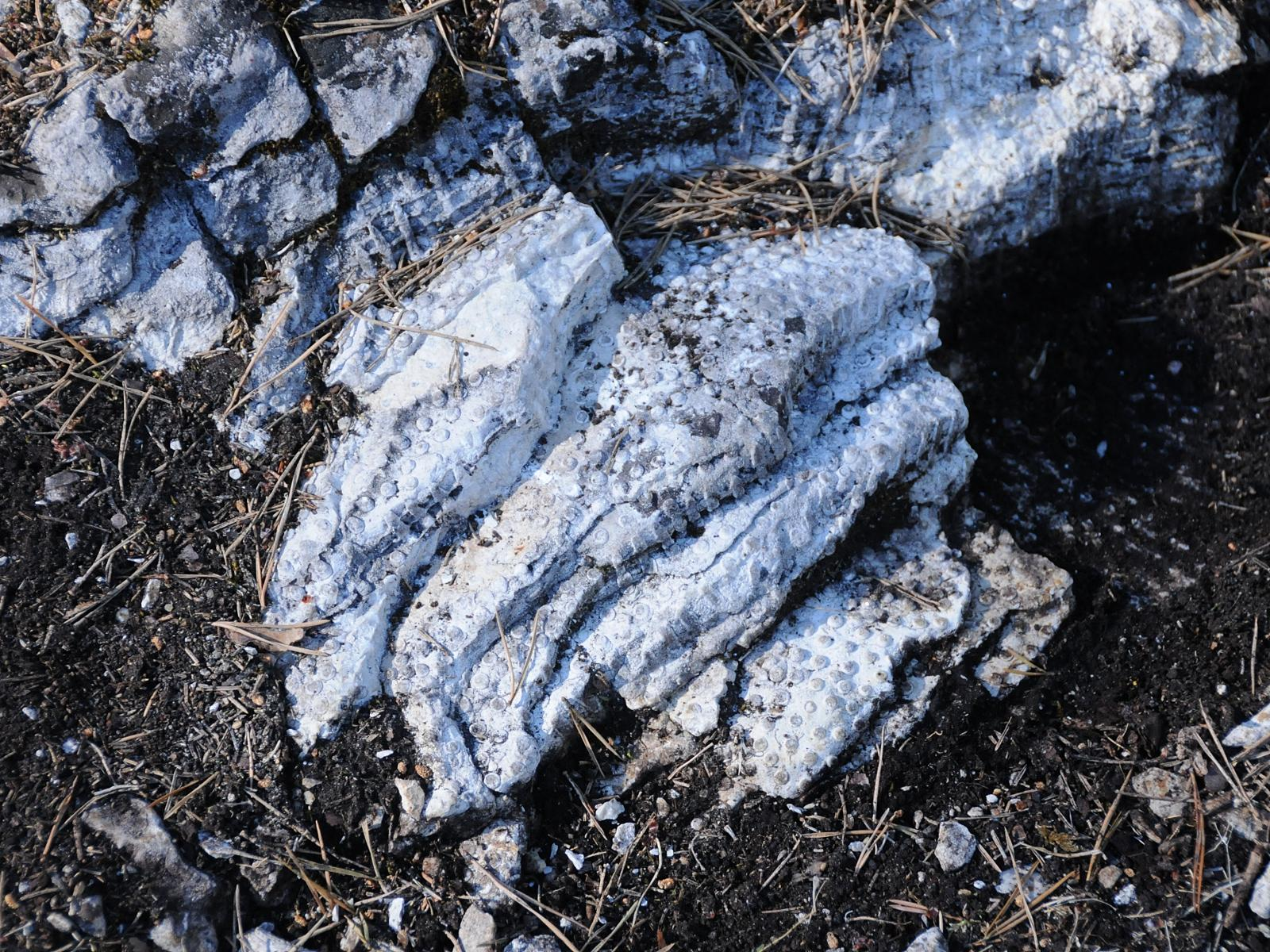 Huitbergi paekühm Vormis saarel